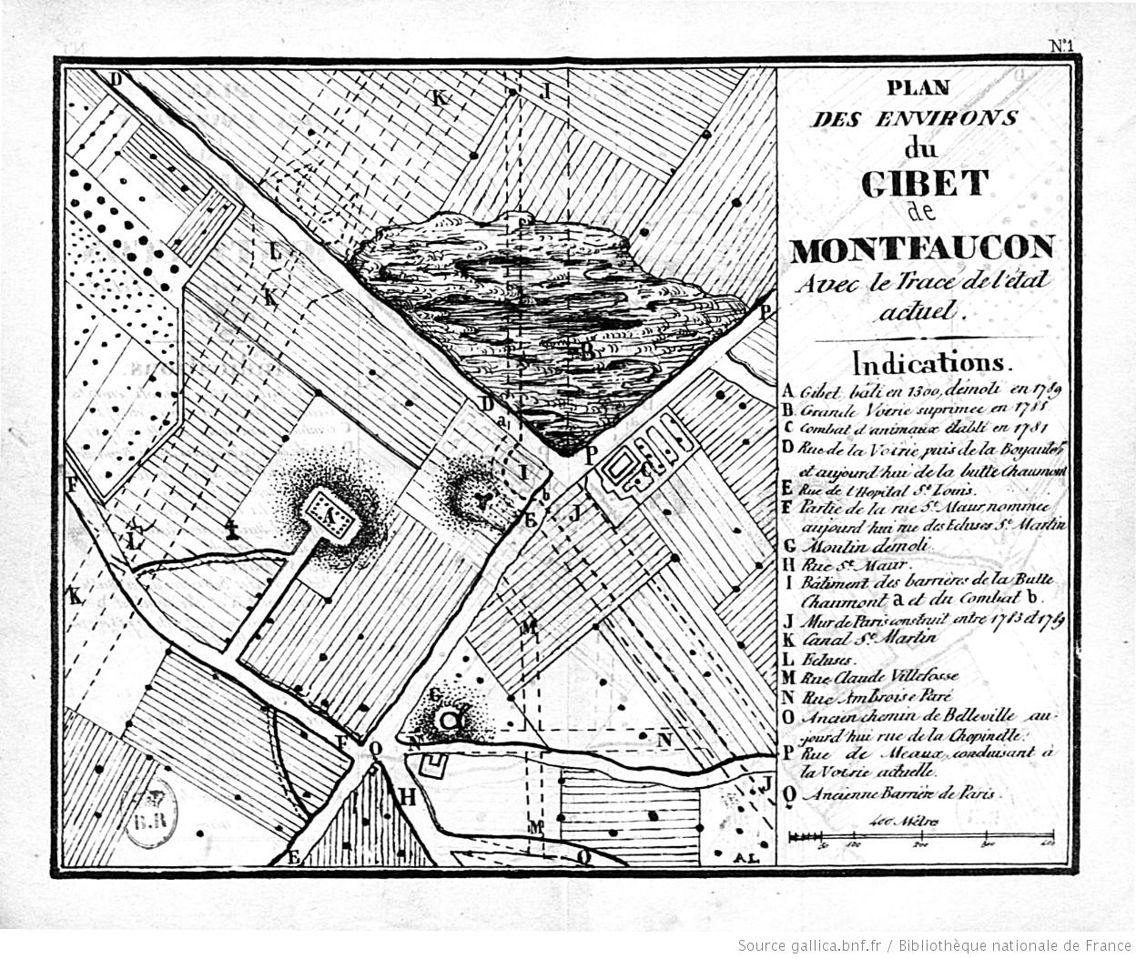 Plan des environs de Montfaucon près de Paris (France) avant 1840 et tracé des nouvelles rues de 1840